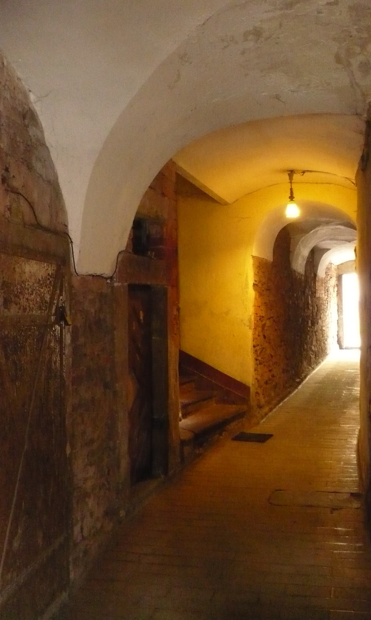 Nowa Ruda, ul. Nadrzeczna 2 - dom tkaczy, korytarz (zabytek nr A/927/1336/WŁ z 7.05.1991